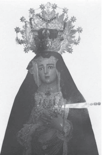 La Virgen de la Piedad a principios del siglo XX.